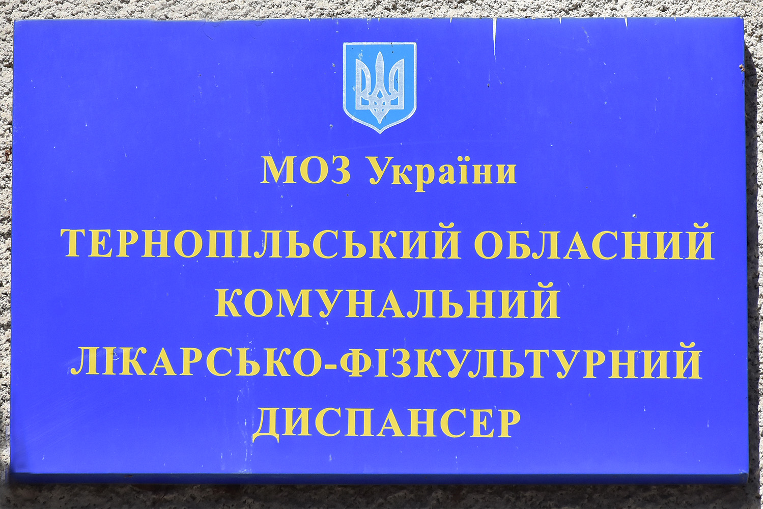 Вивіска: «Тернопільський обласний комунальний лікарсько-фізкультурний диспансер».